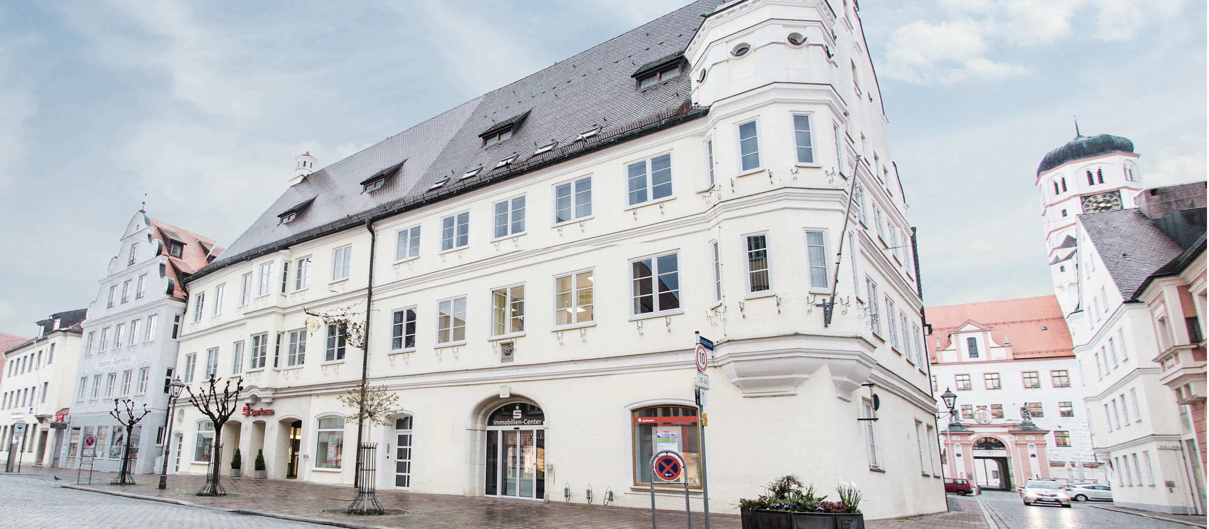 Kreis- und Stadtsparkasse Dillingen